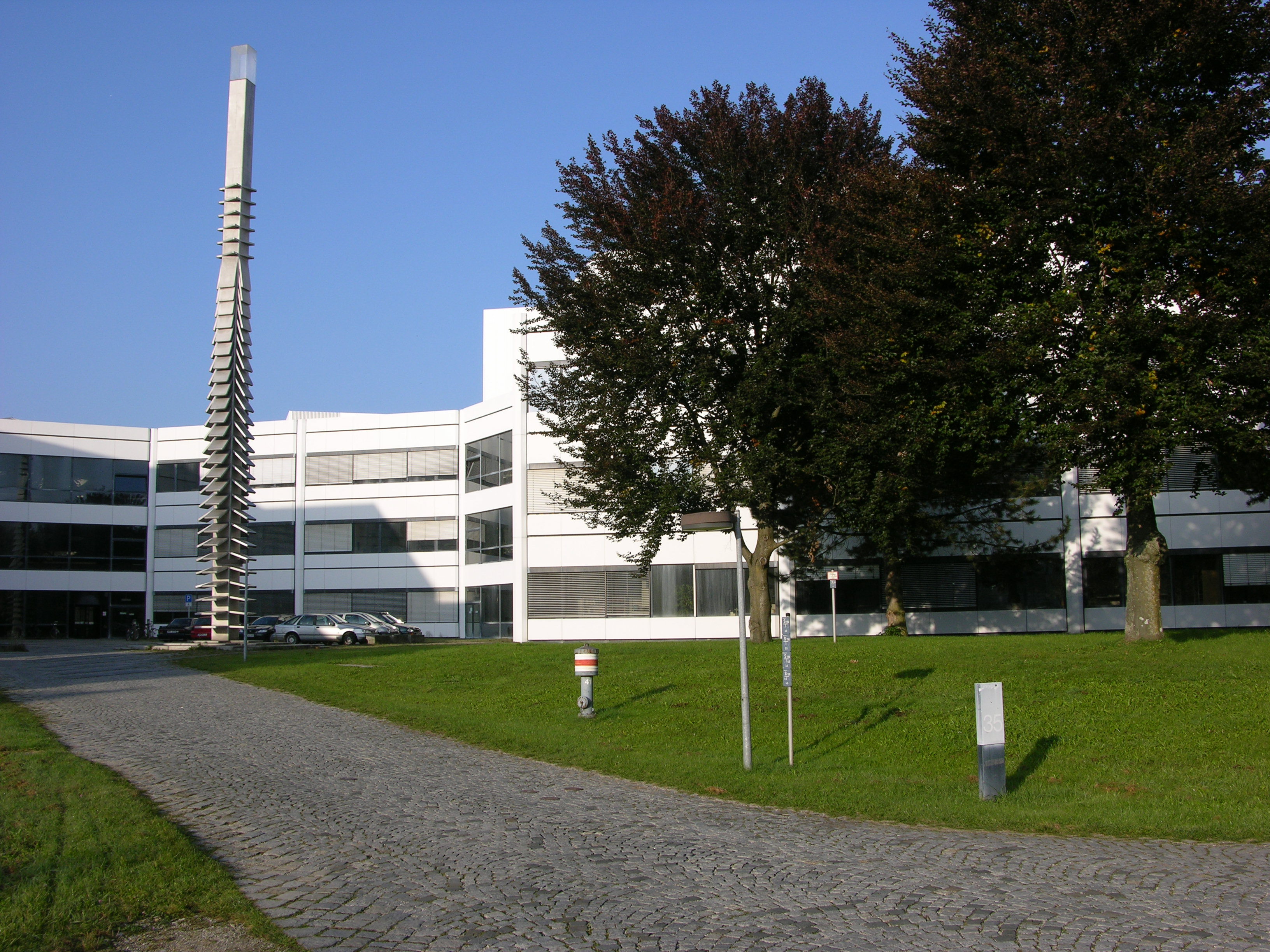 Universitätsbibliothek der Universität der Bundeswehr München, Gebäude 35. Die 23,5 Meter hohe Stele aus Edelstahl links im Bild wurde ca. 1976 von Heinz Mack geschaffen und trägt den Titel „Skulptur für den Himmel“.